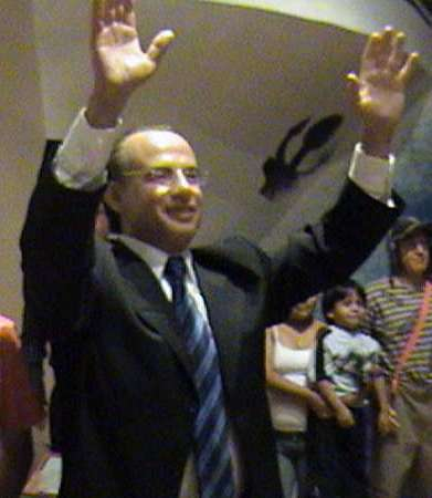 Figura de Felipe Calderón en el Museo de Cera Veracruz